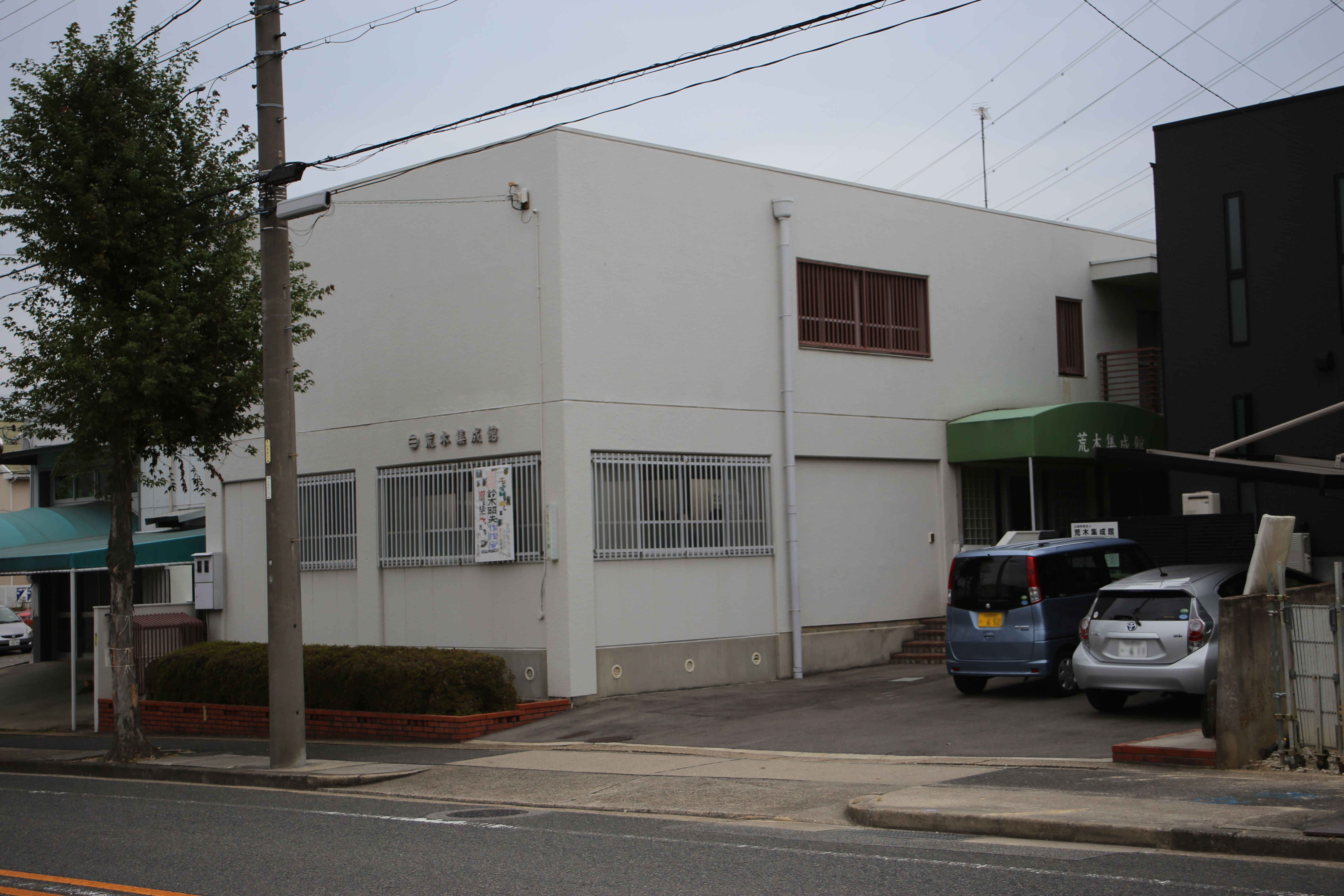 名古屋市天白区中平の荒木集成館を西側公道南側より撮影。ただし、ナンバープレートにつき画像処理済。